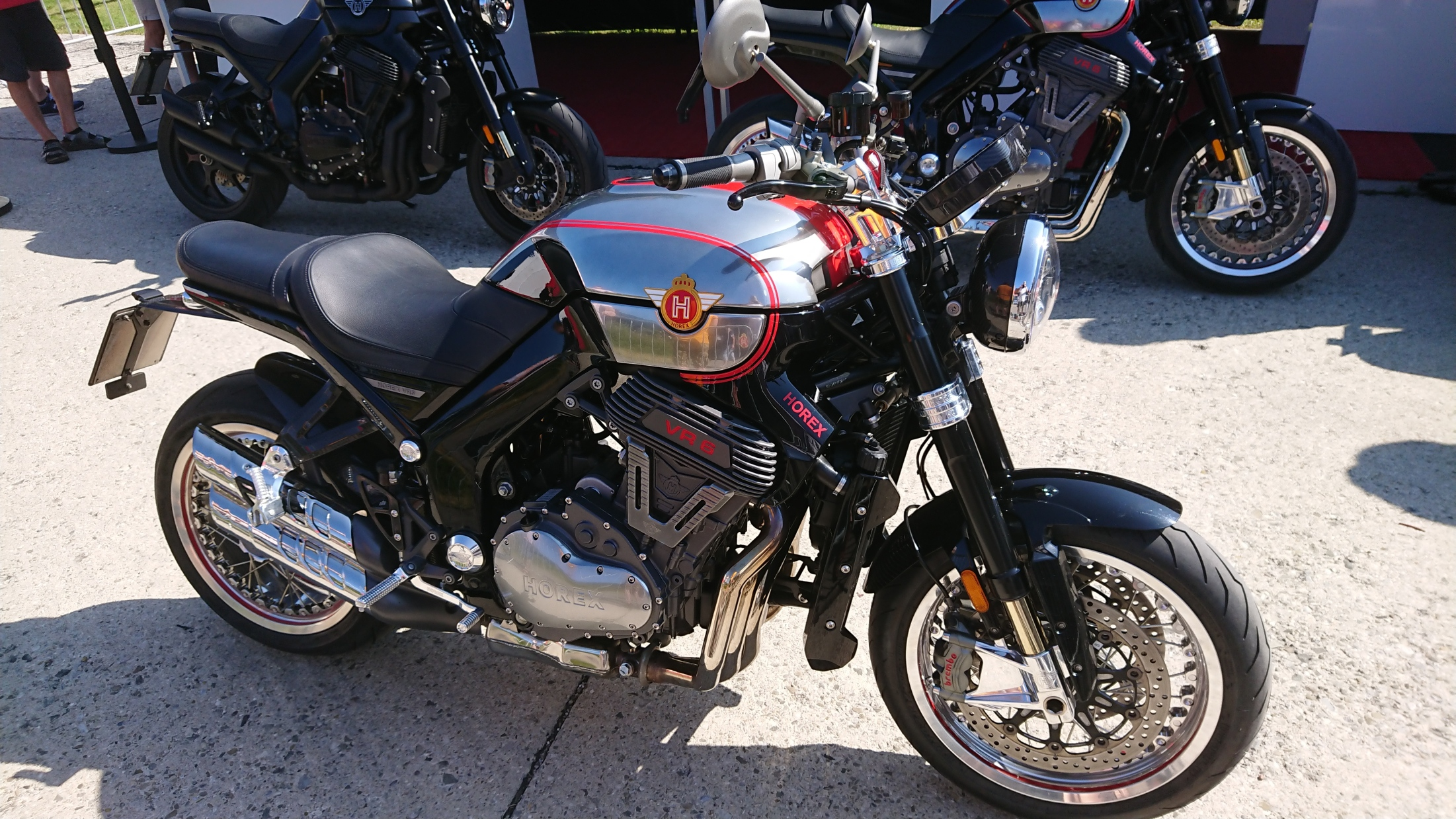 Horex VR 6, Modell Classic, aufgenommen bei Horex Days 2019